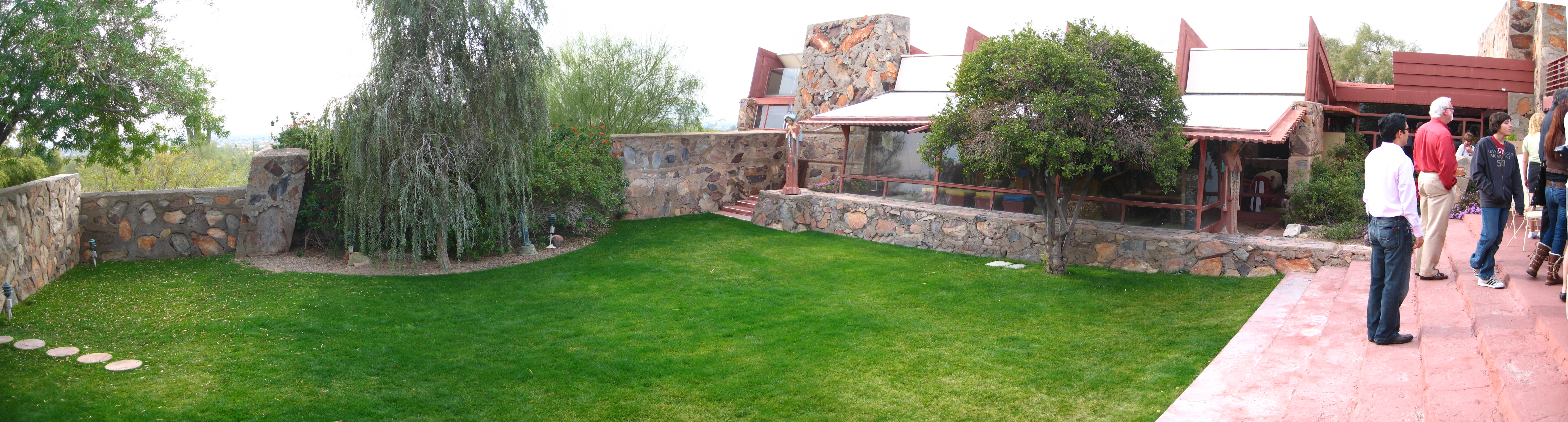 Taliesin West, Scottsdale, AZ, USA.